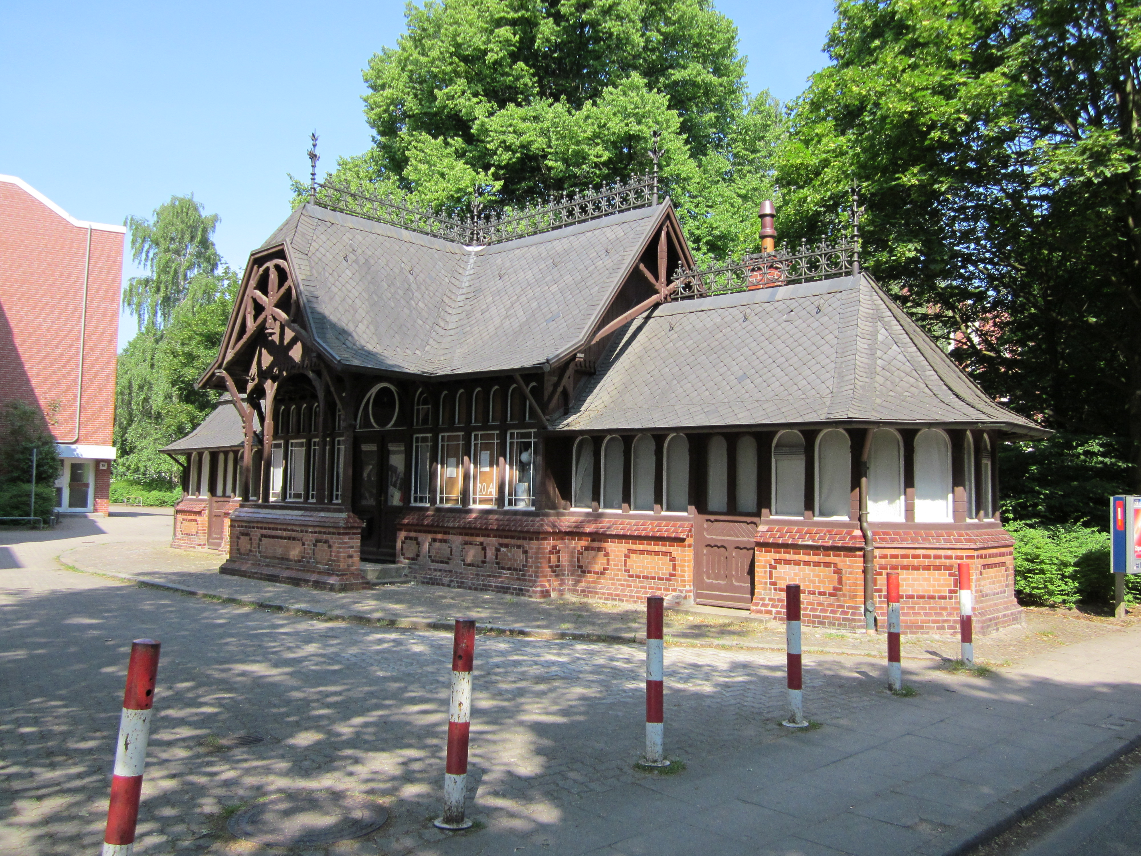 Die ehemalige Endhaltestelle Ohlsdorf der Straßenbahn Hamburg liegt in der Straße Im Grünen Grunde in Ohlsdorf. Nachdem sie bis in die 1970er Jahre bedient wurde, dient das Gebäude heute als privates Kunstatelier.